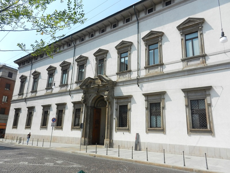 Milano - Arcivescovado